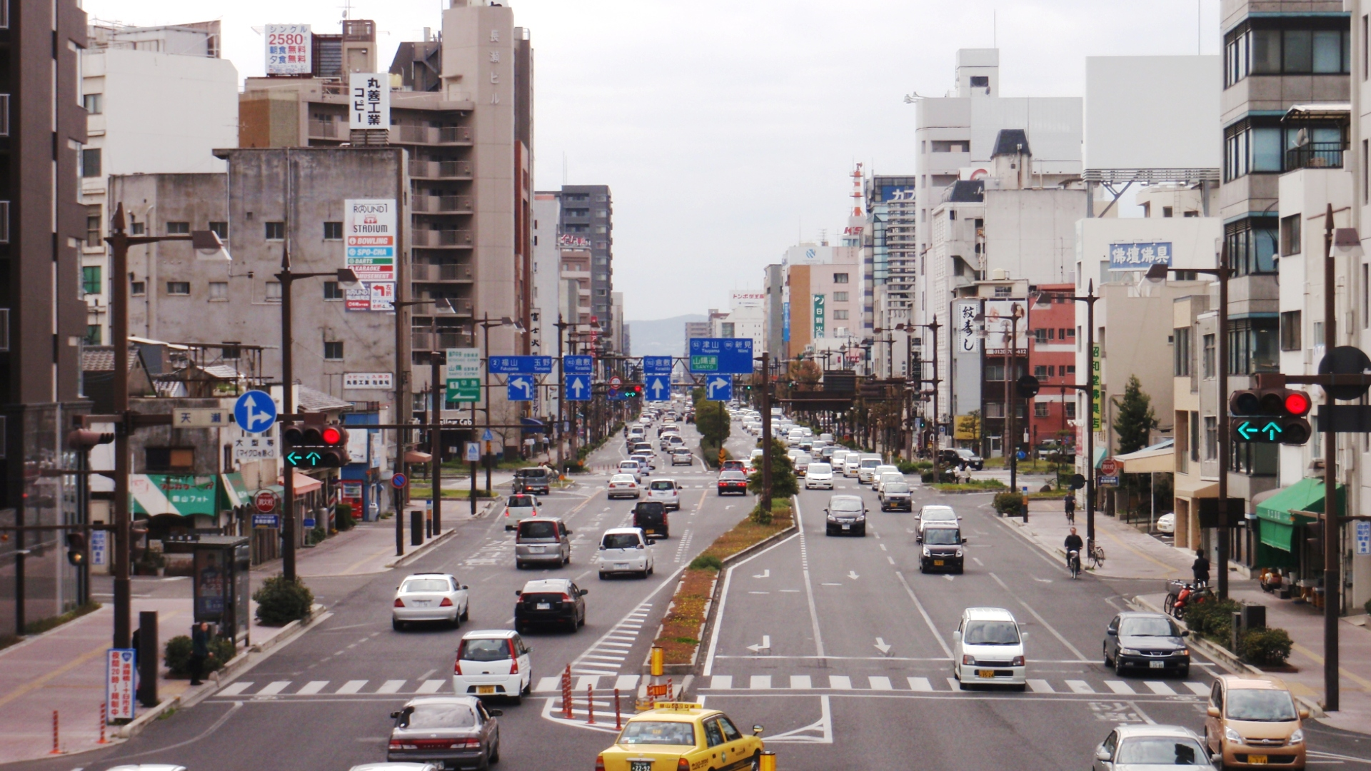 岡山県岡山市北区の国道250号（旧国道2号）、東山通りの風景。表町三丁目付近から西方向、大雲寺交差点を見る。